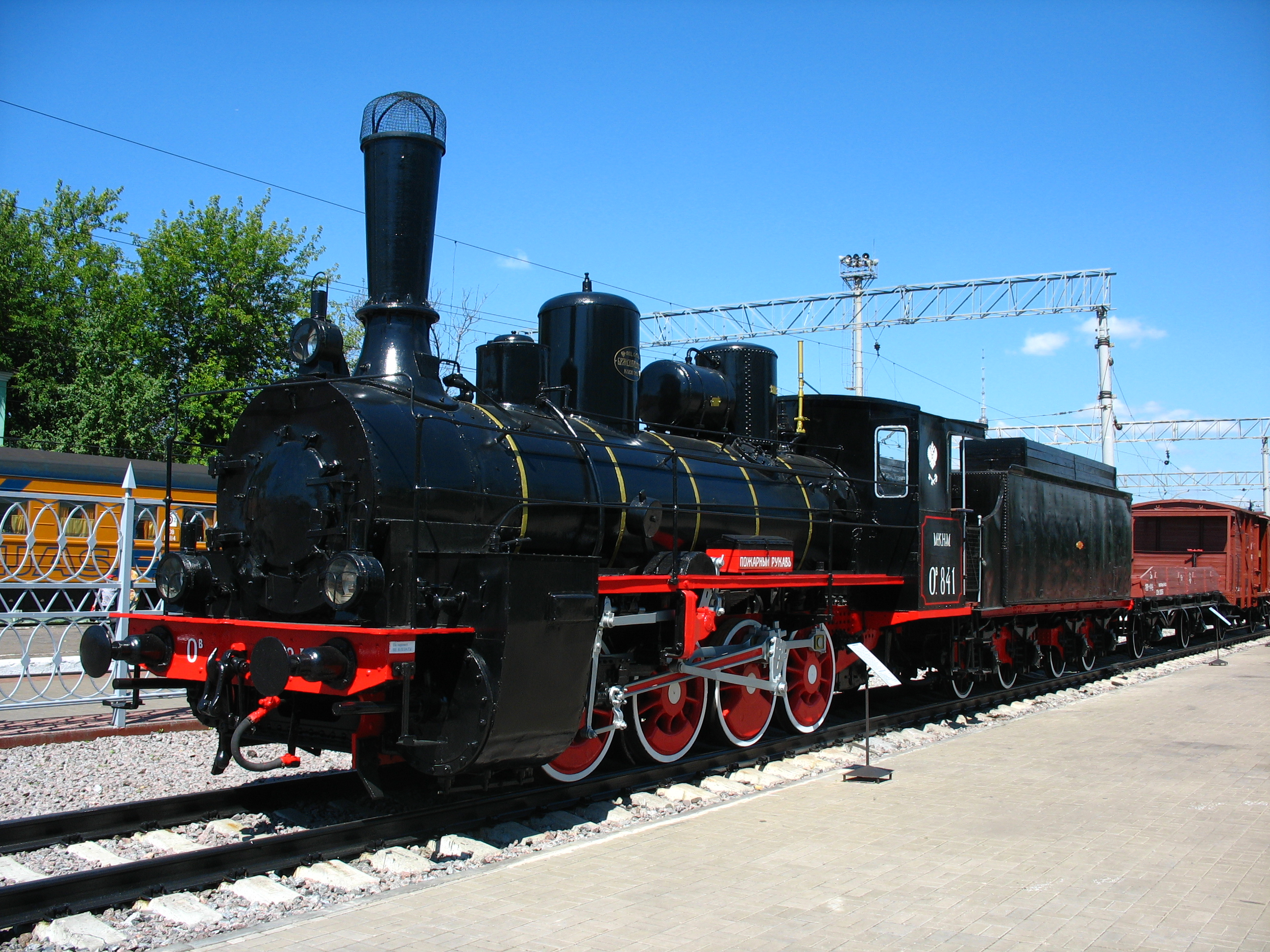 Паровоз Ов.841 в Музее истории развития железнодорожного транспорта Московской железной дороги (на Рижском вокзале Москвы). Паровозы серии О («Основной грузовой паровоз») с машиной двойного расширения («Компаунд») насыщенного пара строились с 1897 г. по 1929 г. из всех паровозостроительных заводах России. Всего выпущено 9129 паровозов О разных индексов. Эксплуатировались до 1960-х годов. Паровоз Ов.841 (с парораспределением системы Вальсхарта) построен в 1903 г. на Брянском машиностроительном заводе для Рязанско-Уральской дороги с обозначением Т.841. Реставрирован с 1993 по 2004 годы в локомотивных депо Рославль и Подмосковная с участием ВОЛЖД. Подготовлен к экспозиции локомотивным депо Москва-Курская. Является памятником науки и техники Российской Федерации первой категории.